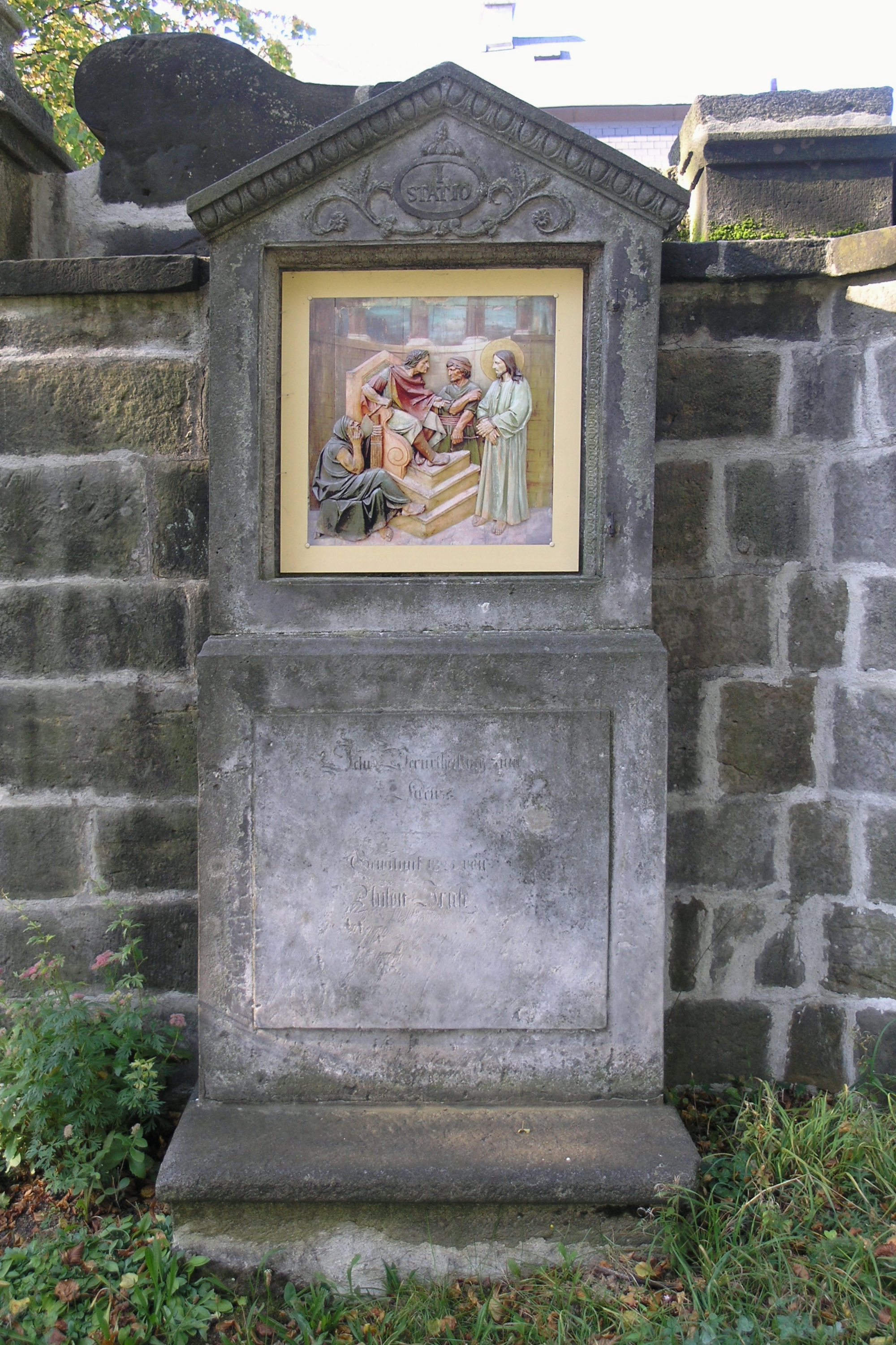 Zastavení křížové cesty při obvodové zdi prostranství u kostela svatého Jana Nepomuckého ve Starých Křečanech